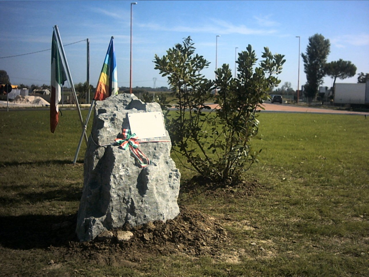 Cippo commemorativo e pianta di corbezzolo donata da Moresco (AP), posti a Pioppa (FC), Italia.